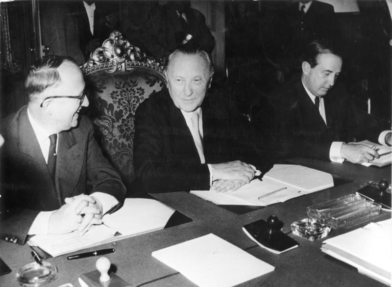 Beitritt der Bundesrepublik Deutschland zum Nordatlantikpakt. Herausforderung des deutschen Volkes durch die Bonner Militaristen. In Paris will Adenauer am 23.10.1954 Abmachungen unterschreiben, die ein neues Komplott gegen den Frieden, eine unerhörte Herausforderung des deutschen Volkes und aller europäischen Völker durch die Bonner Militaristen darstellt. Mit der Unterzeichnung neuer Verträge über die Aufrüstung Westdeutschlands und seiner Einbeziehung in den NATO-Militärpakt soll der deutsche Militarismus wiedererrichtet und die friedliche Wiedervereinigung Deutschlands unmöglich gemacht werden. U. B. z.: Verräter am Deutschen Volk und am Frieden in Europa. Von links nach rechts: Staatssekretär Hallstein, Bundeskanzler Dr. Adenauer und Botschafter Blankenhorn während der Konferenz in Paris.